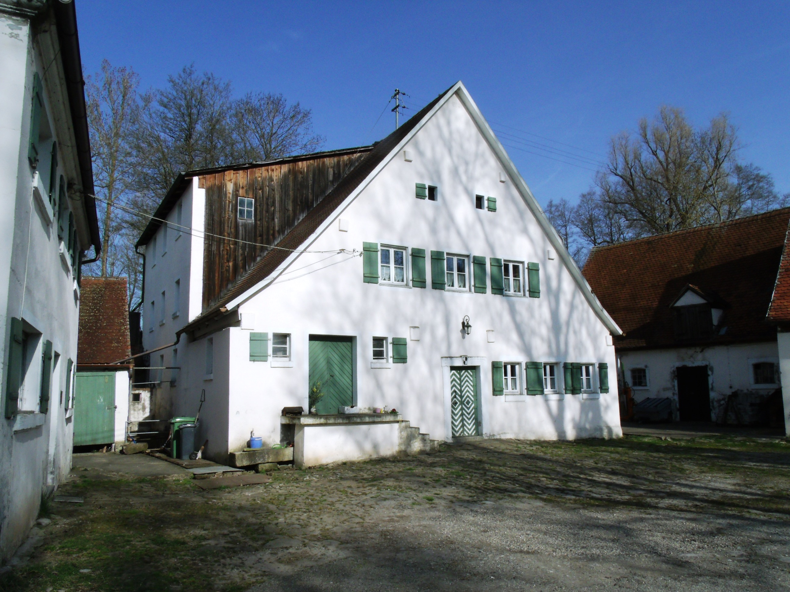 Neudorfer Mühle in Neudorf, Stadtteil von Ansbach in Mittelfranken